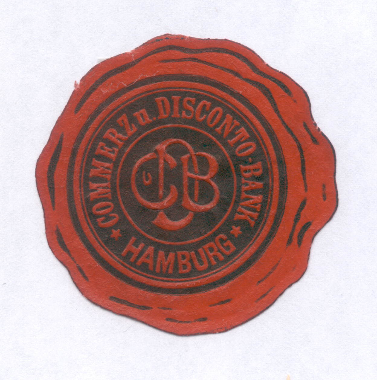 Logo / Siegelmarke der Commerz- und Direktbank vor 1920.